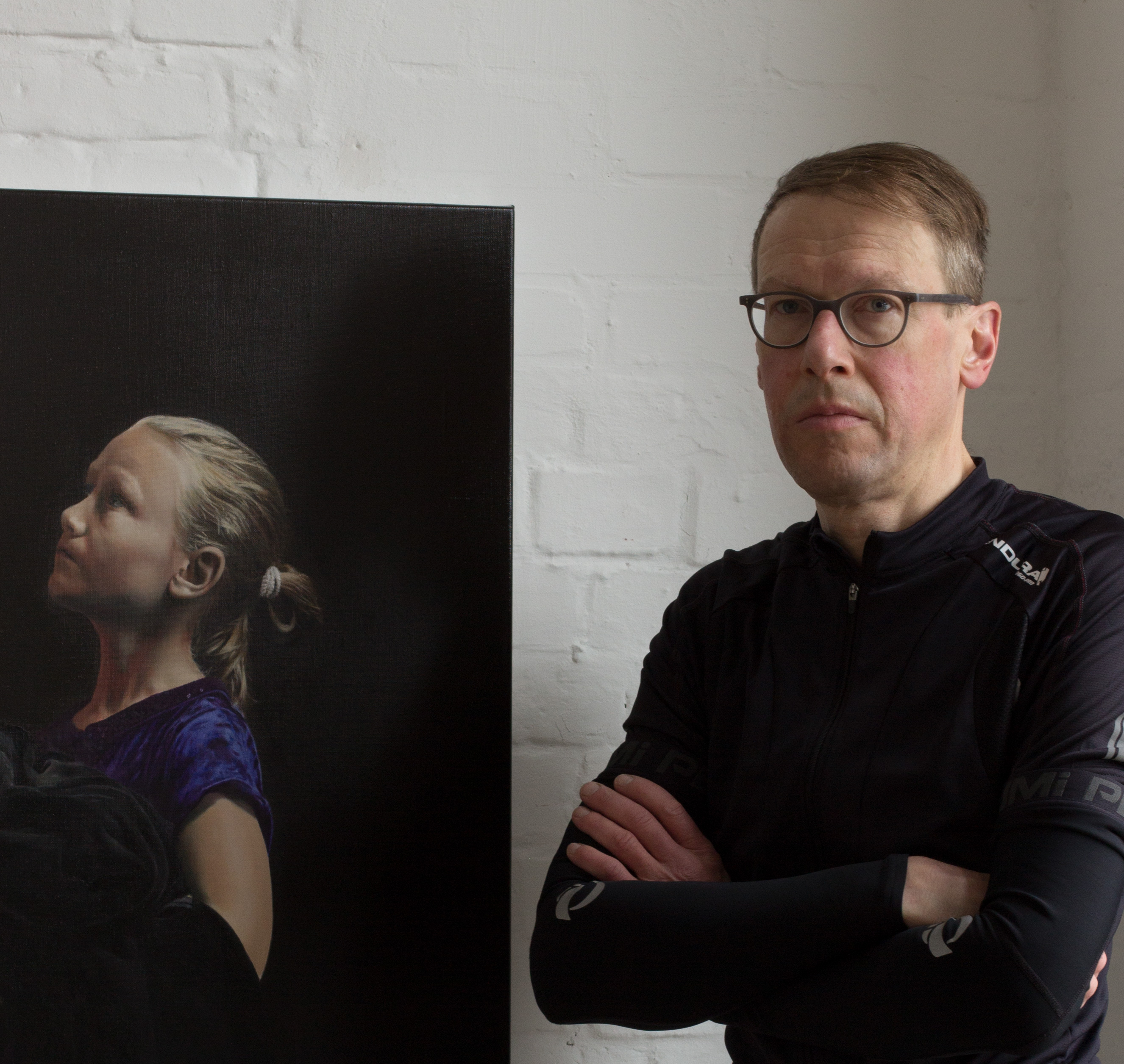 Wolfgang Kessler im Atelier, März 2017